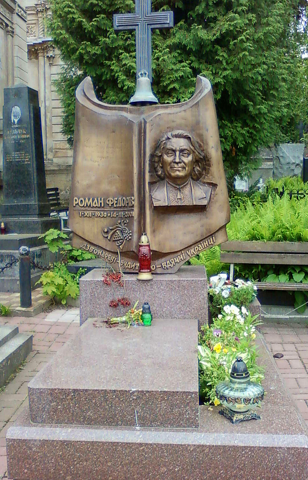 Памятник на могиле писателя Федорива Романа Николаевича на Лычаковском кладбище (Львов)